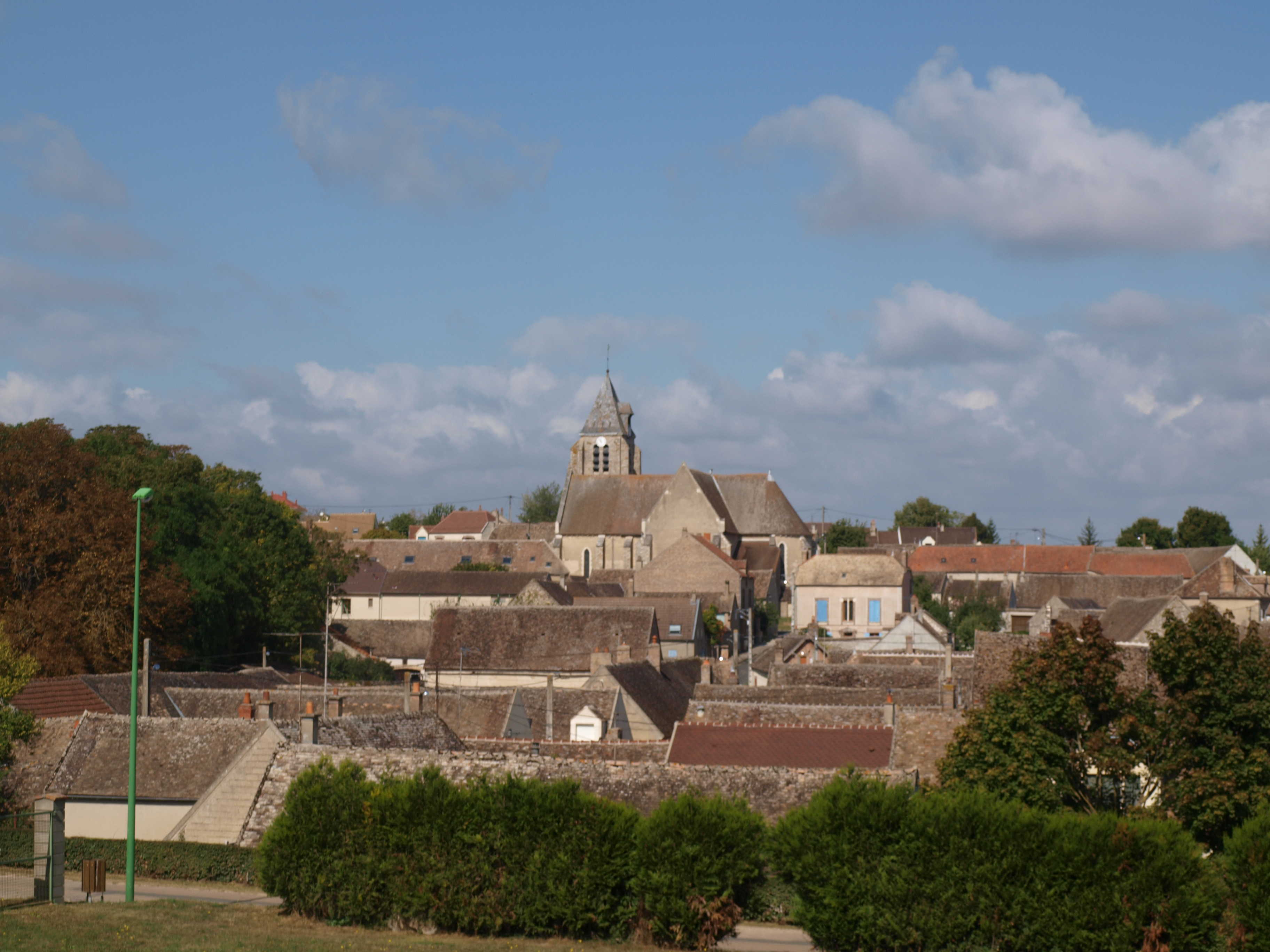 Villemanoche (Yonne, France), Vue depuis la grande salle des fêtes.